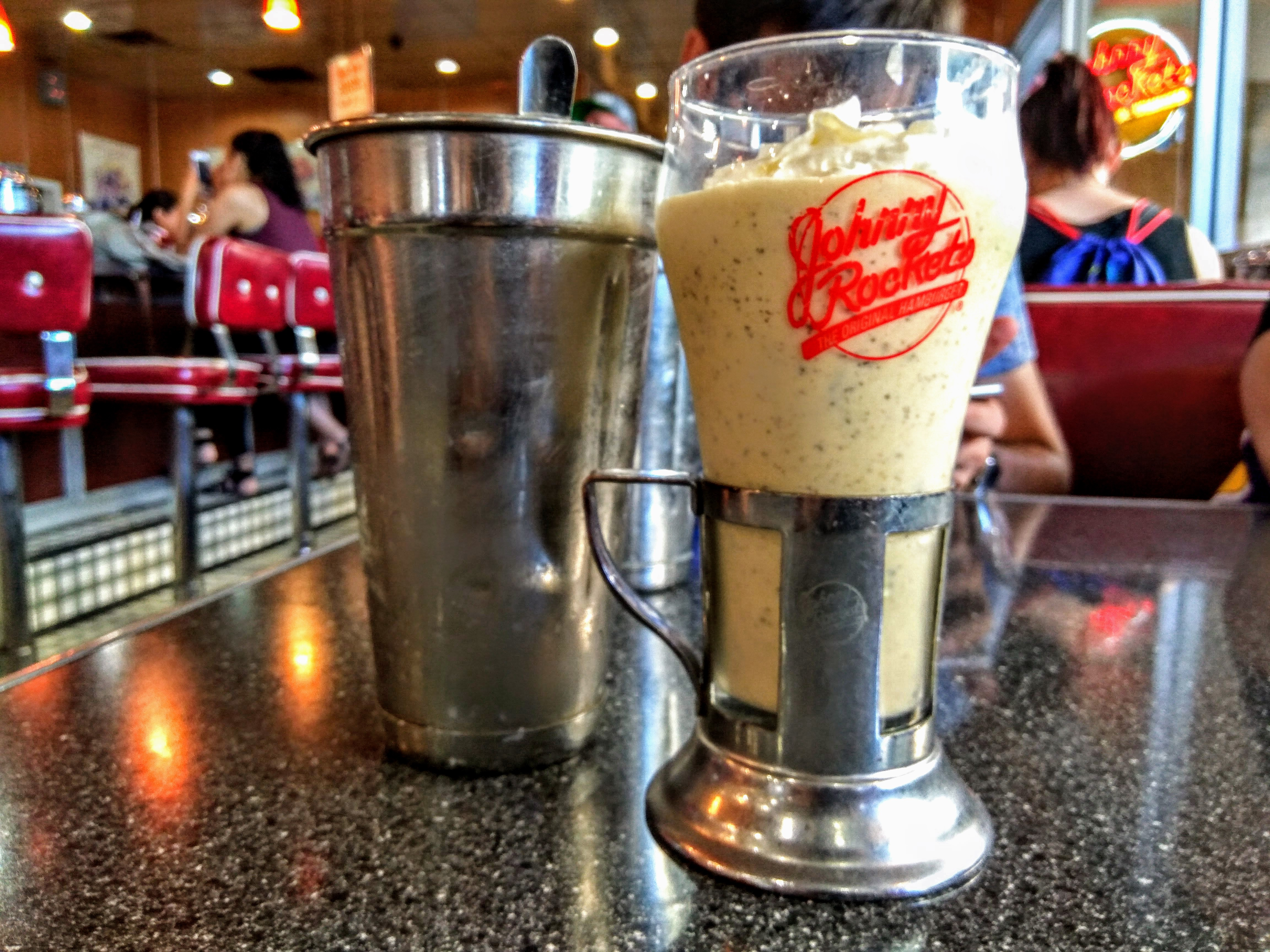 Batido de oreo en Johnny Rockets, dentro del restaurante situado en Hollywood (California, EEUU).